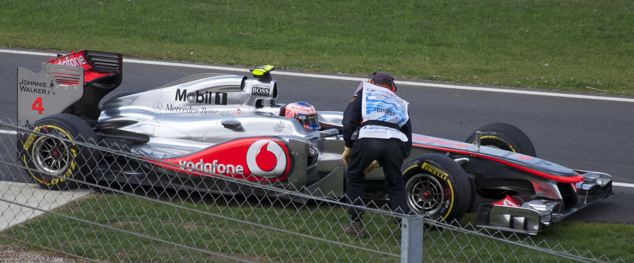 Button retires